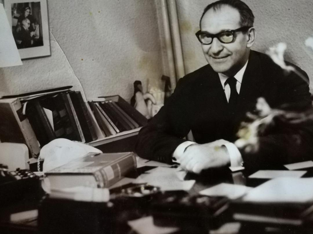 Prof. Dr. Panait Sarbu nel suo studio